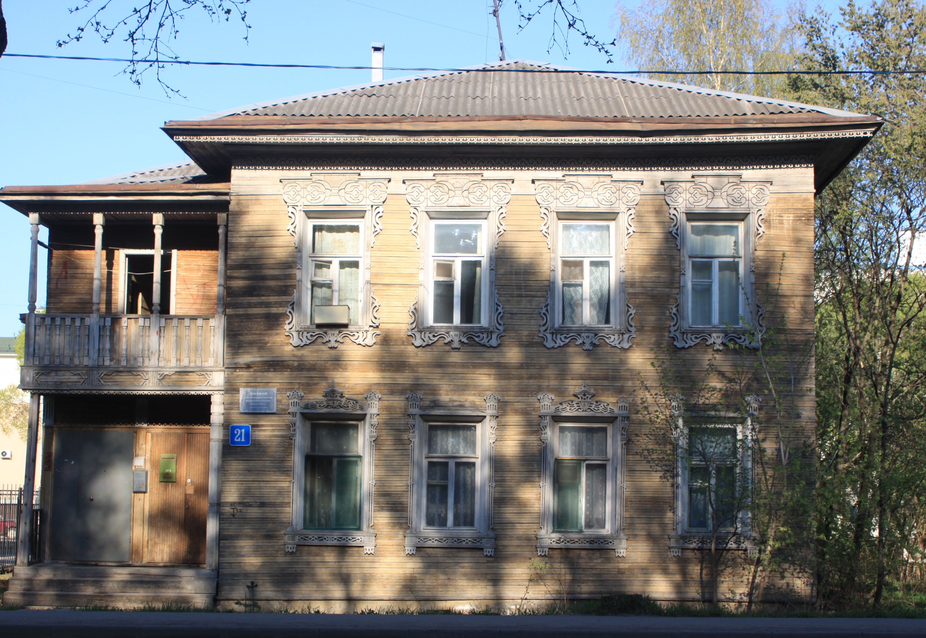 Деревянный дом на Зосимовской ул. Вологды